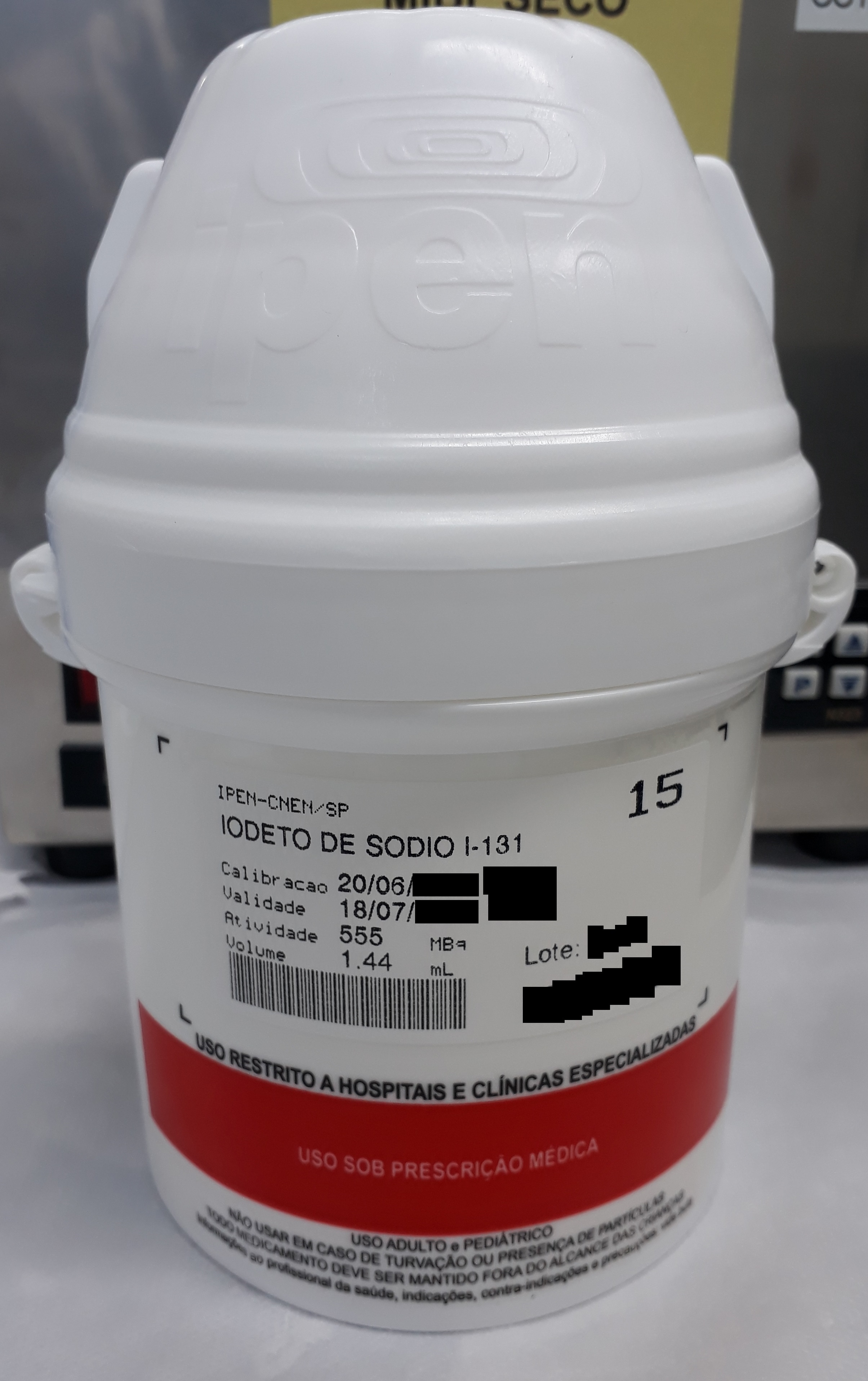 Exemplo da embalagem